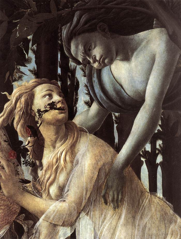 BOTTICELLI, Sandro Primavera Tempera on panel, 203 x 314 cm Galleria degli Uffizi, Florence